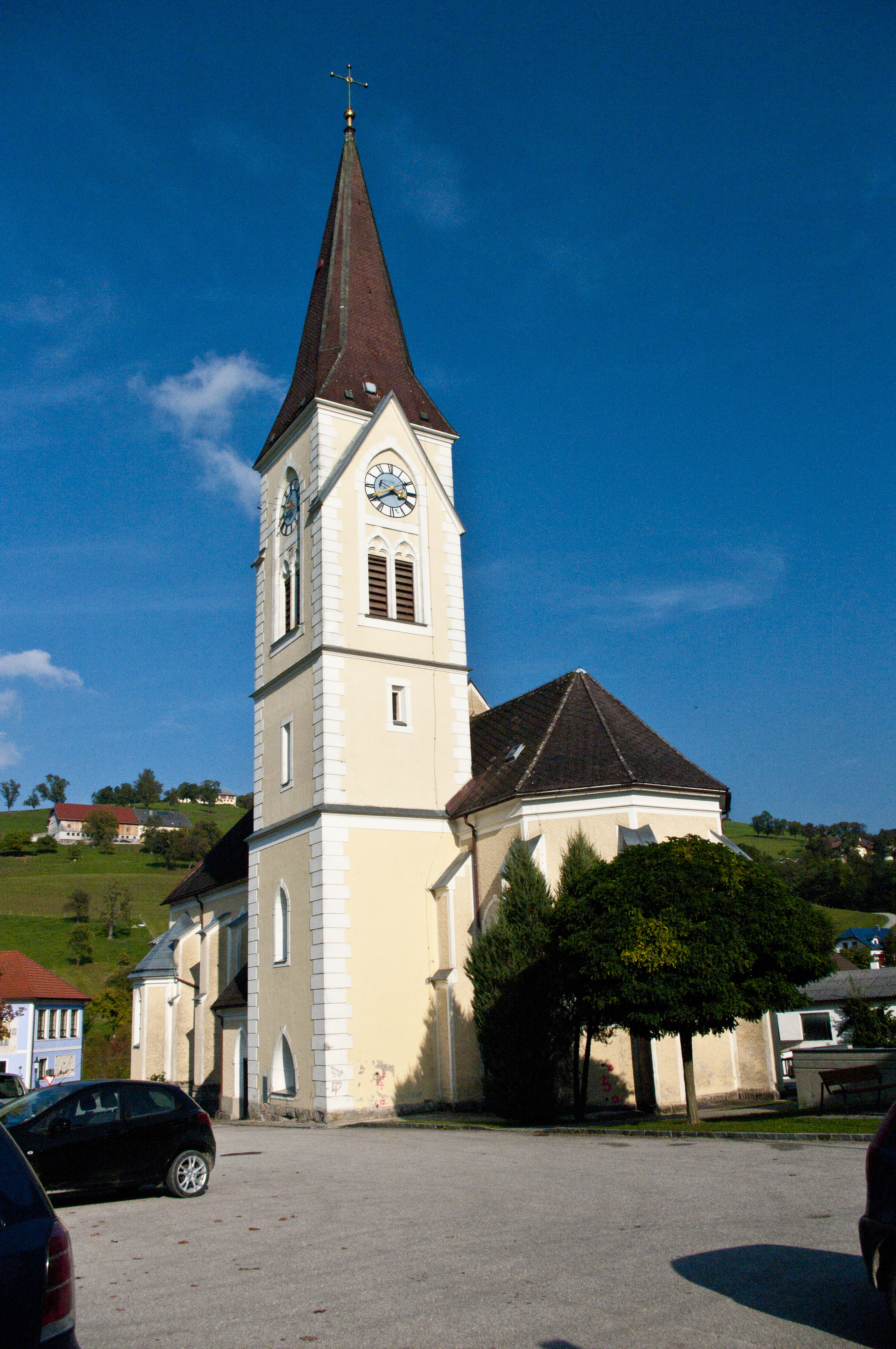 Kath. Pfarrkirche Hl. Familie